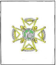 médaille de l'Ordre_des_comtes_de_Lyon; création de Louis XV en 1745.